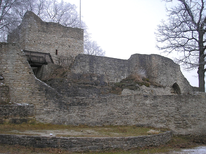 Burg Treuchtlingen (Obere Burg, Landkreis Weißenburg-Gunzenhausen, Mittelfranken). Die Hauptburg von Süden. Eigene Aufnahme, Dez. 2007 / Treuchtlingen castle (Upper castle, Middle Franconia, Bavaria, Germany). Central castle from the south. Own photo, Dec. 2007